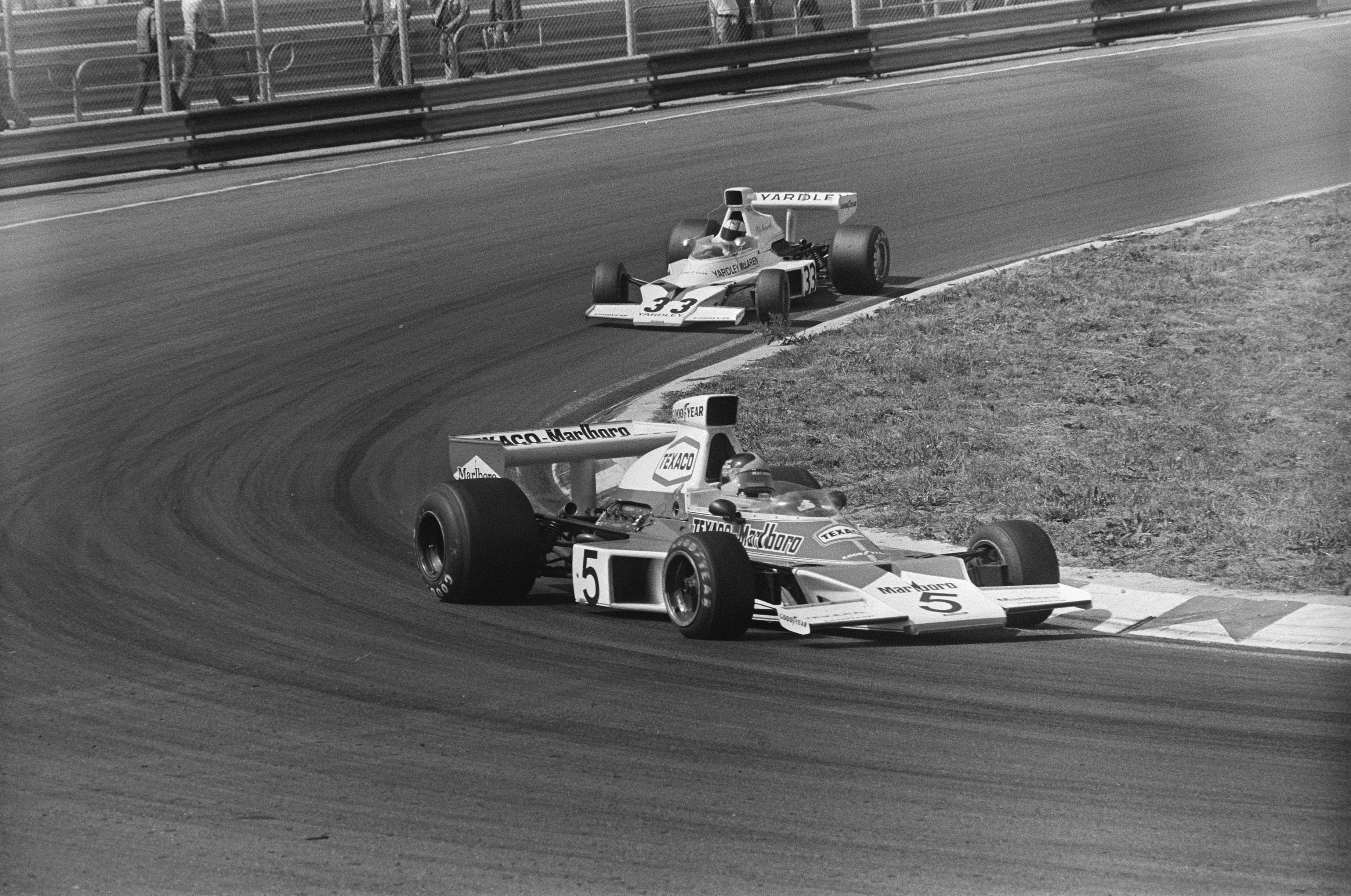 Collectie / Archief : Fotocollectie Anefo Reportage / Serie : [ onbekend ] Beschrijving : Grand Prix op Zandvoort, nr. 19, 20, 22 Fitipaldi (5) en Hailwood (33) in actie Datum : 23 juni 1974 Locatie : Noord-Holland, Zandvoort Trefwoorden : autoraces Persoonsnaam : Hailwood Fotograaf : Croes, Rob C. / Anefo Auteursrechthebbende : Nationaal Archief Materiaalsoort : Negatief (zwart/wit) Nummer archiefinventaris : bekijk toegang 2.24.01.05 Bestanddeelnummer : 927-2754